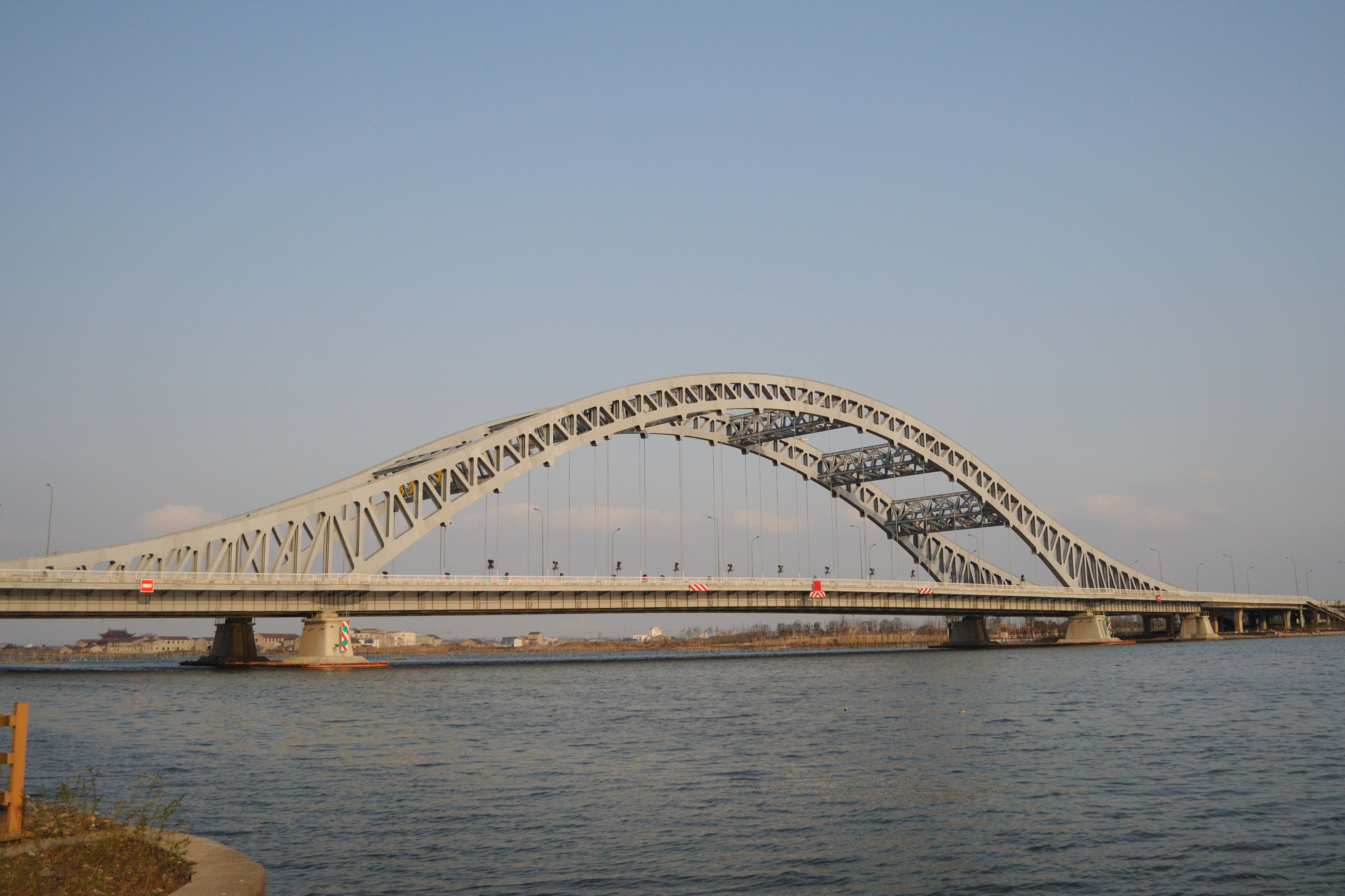 宁波湾头大桥